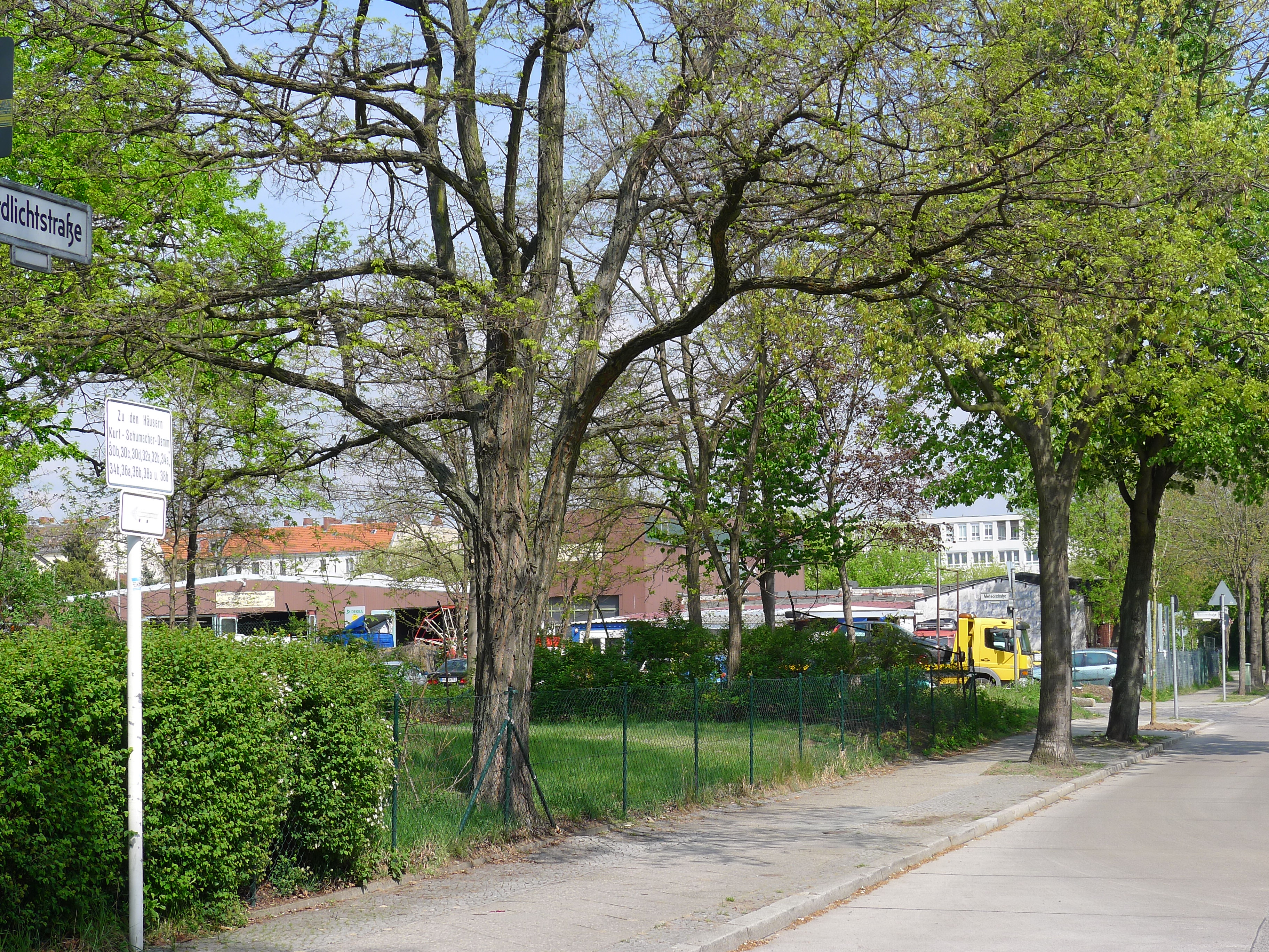 Straßenpanorama